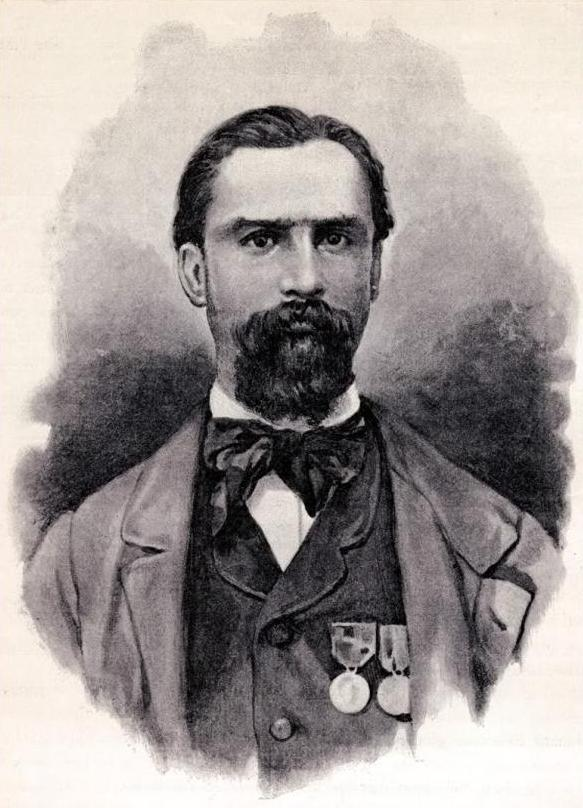 Il patriota Livio Zambeccari Immagine tratta da Jessie W. Mario, "Garibaldi e il suo tempo", F.lli Treves Editori, Milano, 1892